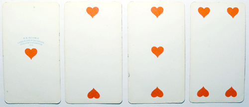 Cego Kartenspiel: Die 4 leeren Herz Karten